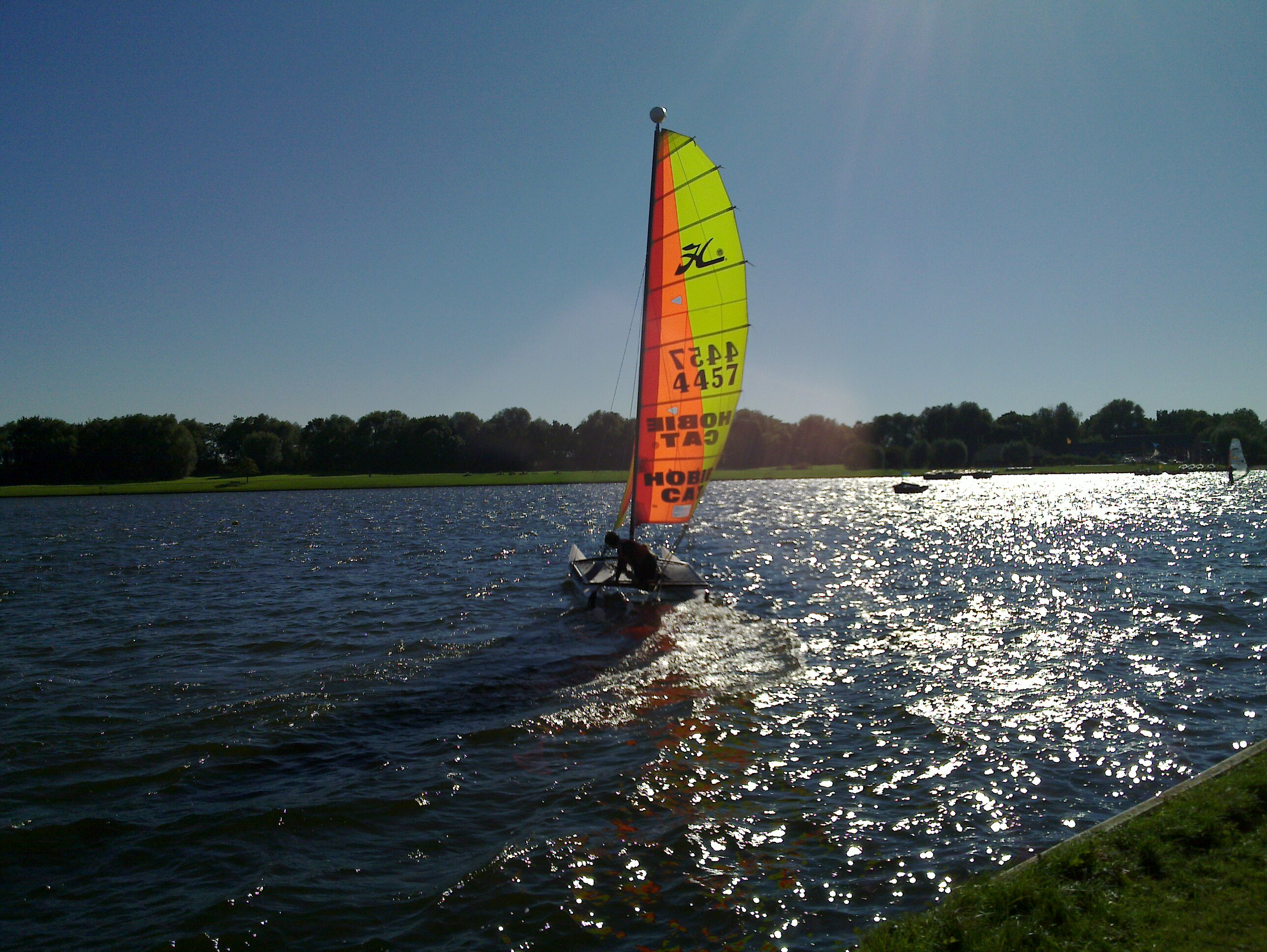 Le lac des Près du Hem